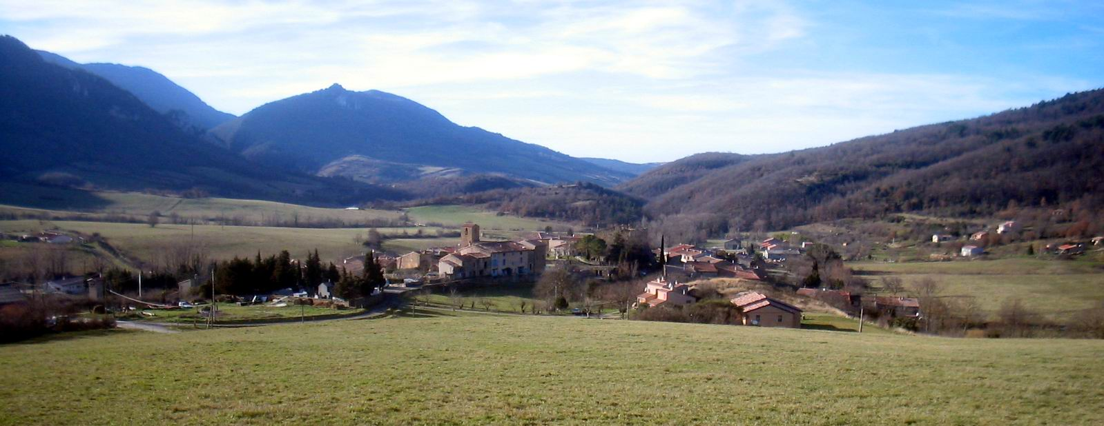 Bugarach : vue depuis le versant du Pic de Bugarach